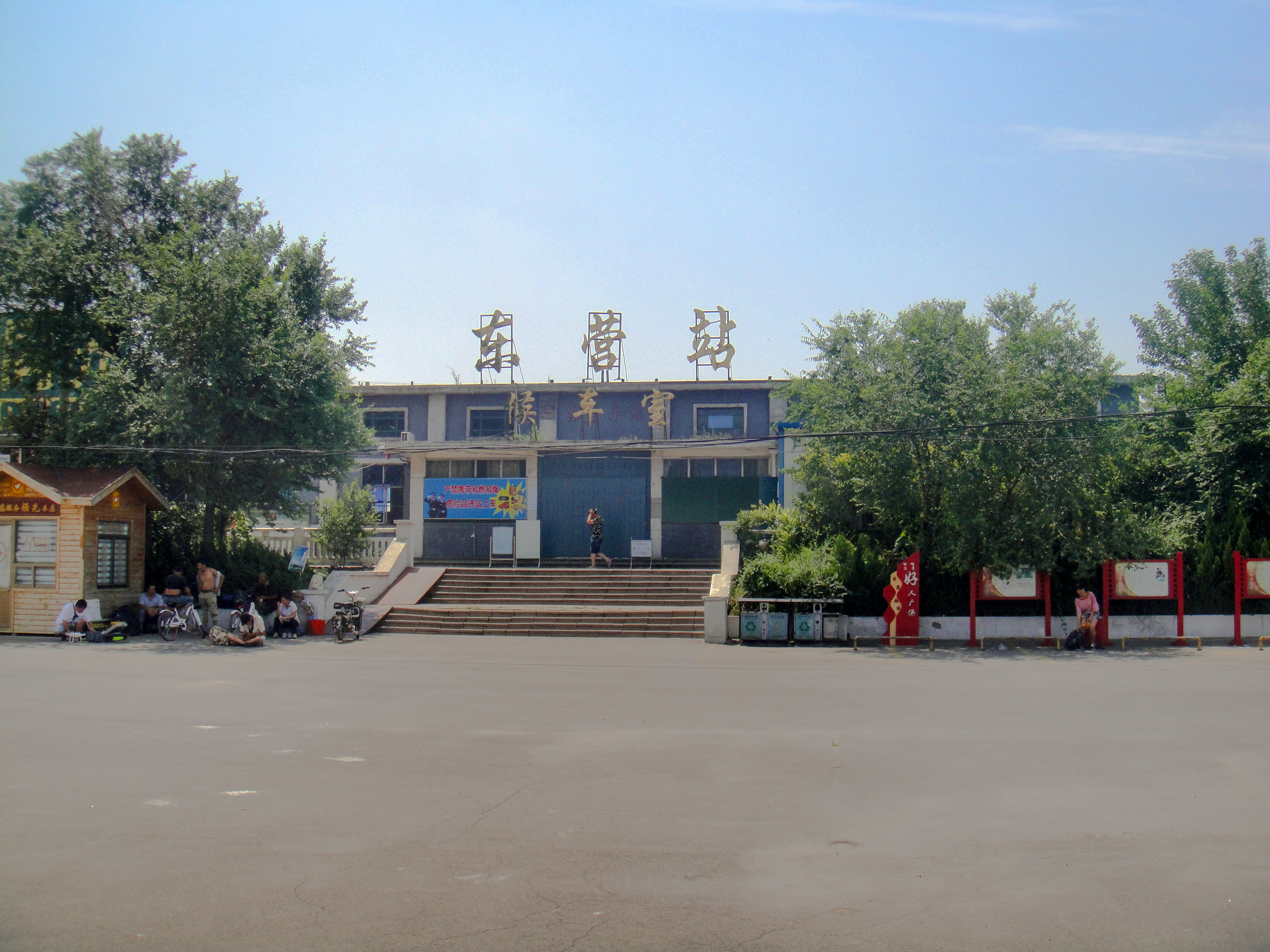 东营火车站站房